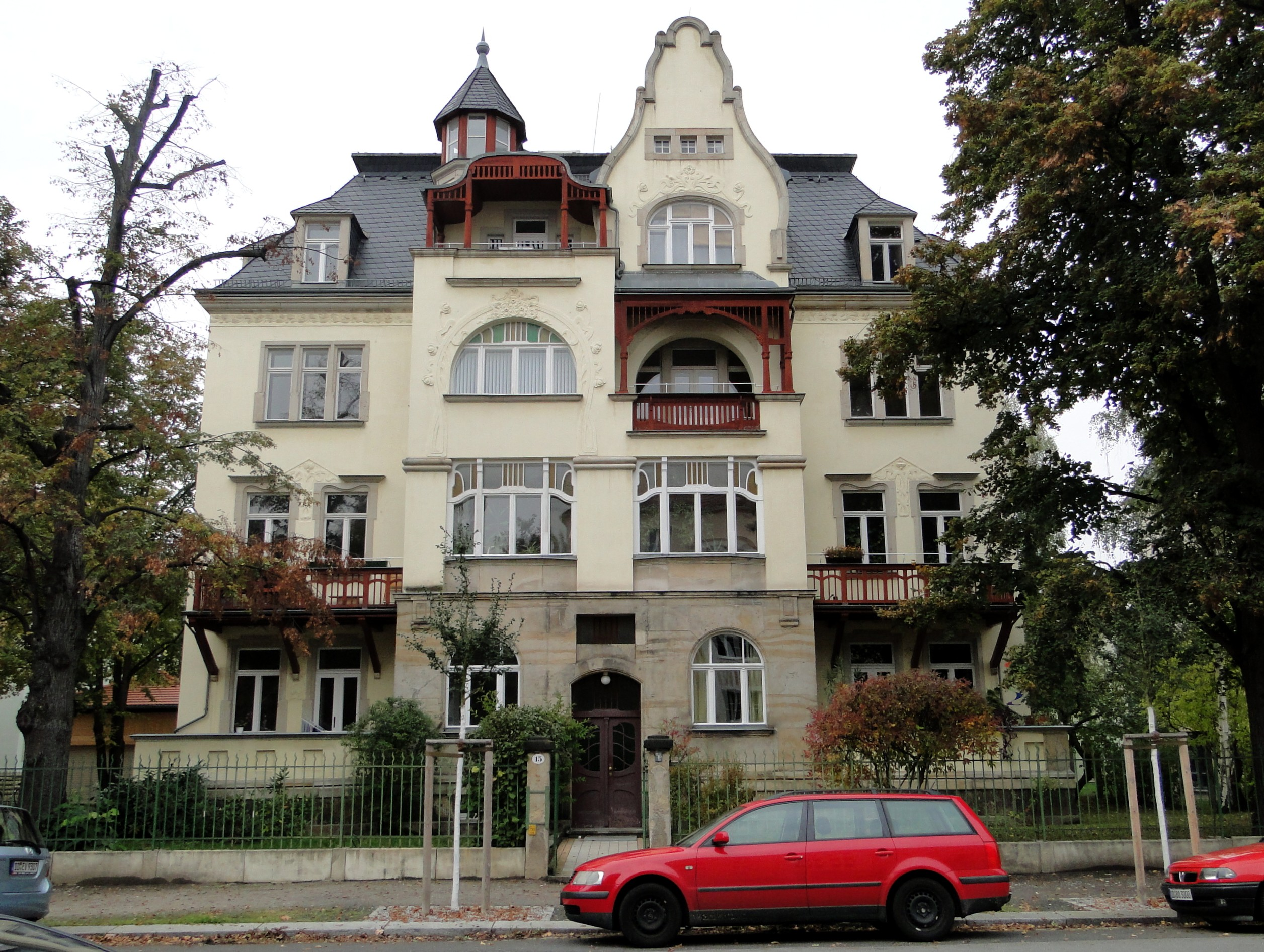 Jugendstilbau in Dresden